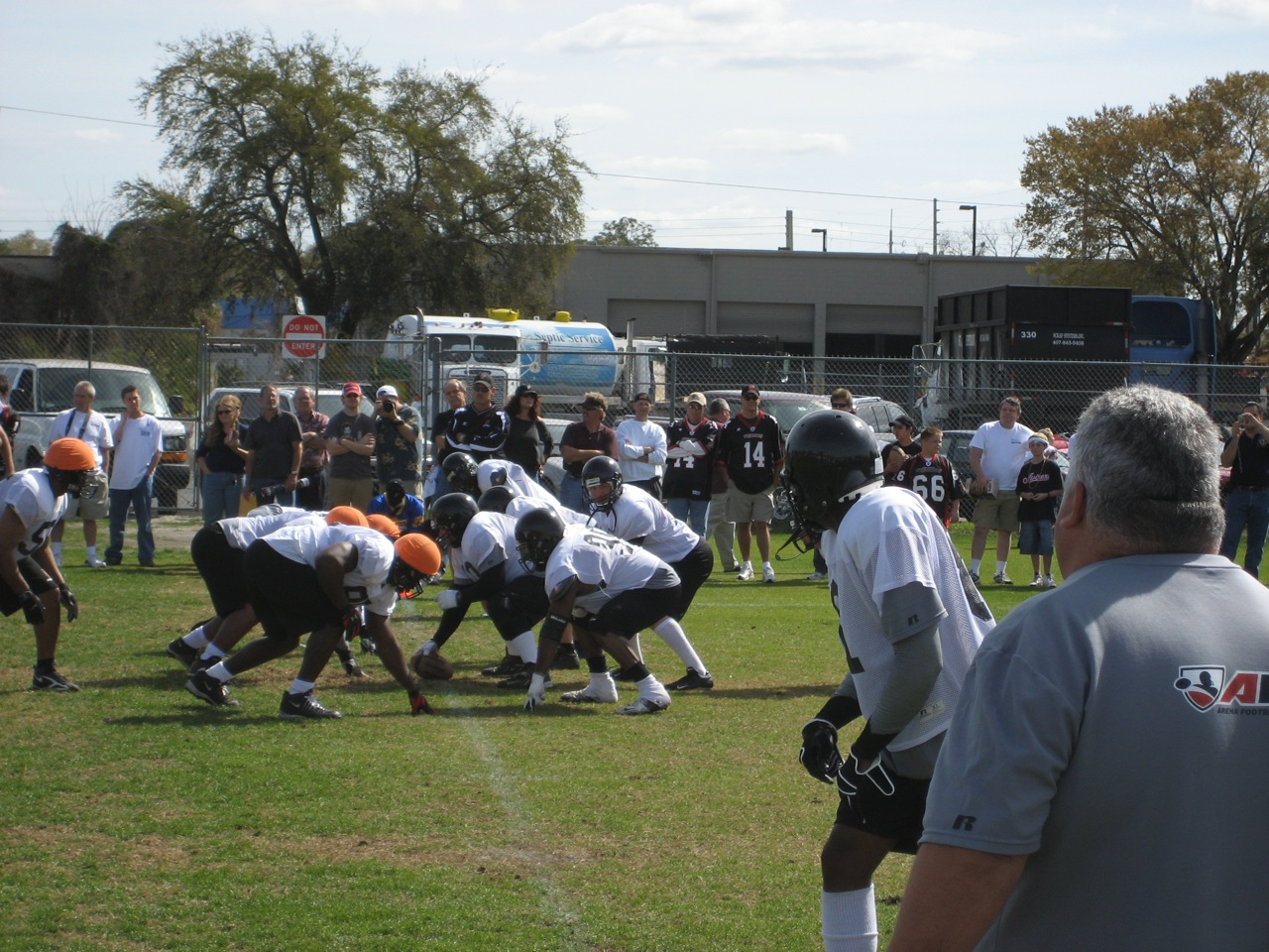 Practice